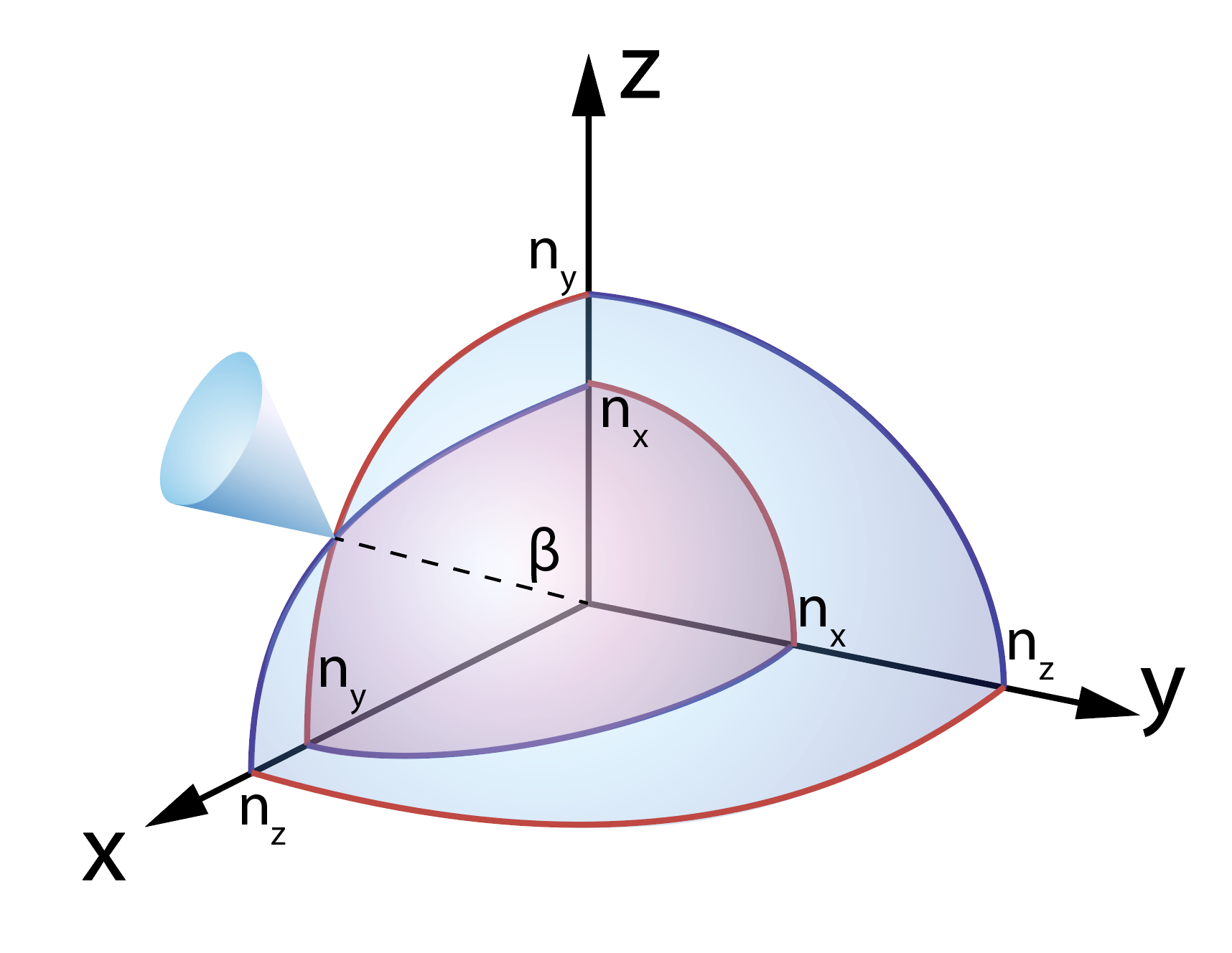 Поверхность волновых векторов в двуосном кристалле. Изображена в одном октанте.